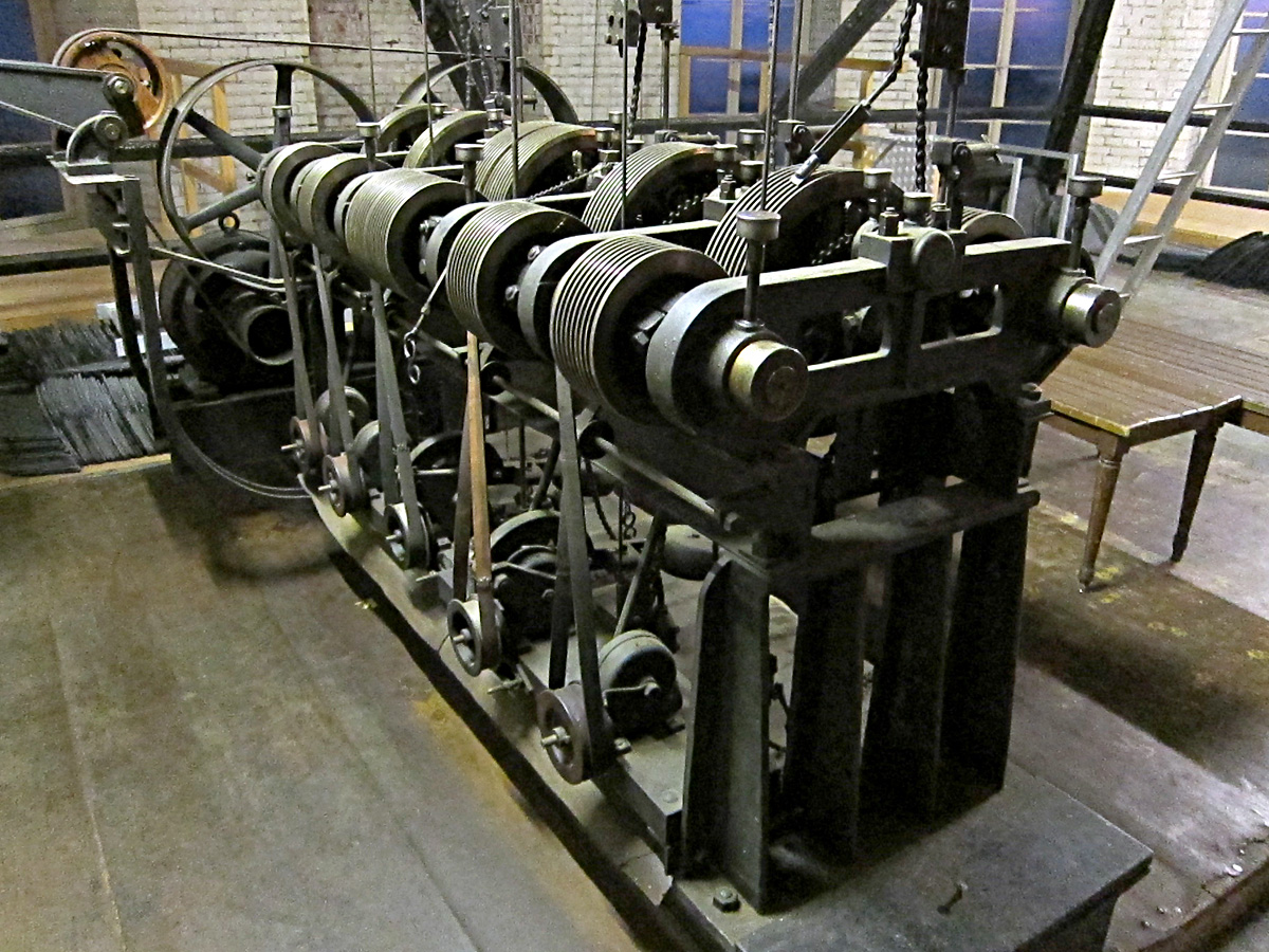 Läutemaschine in der Kuppel der Kreuzkirche Zürich-Hottingen